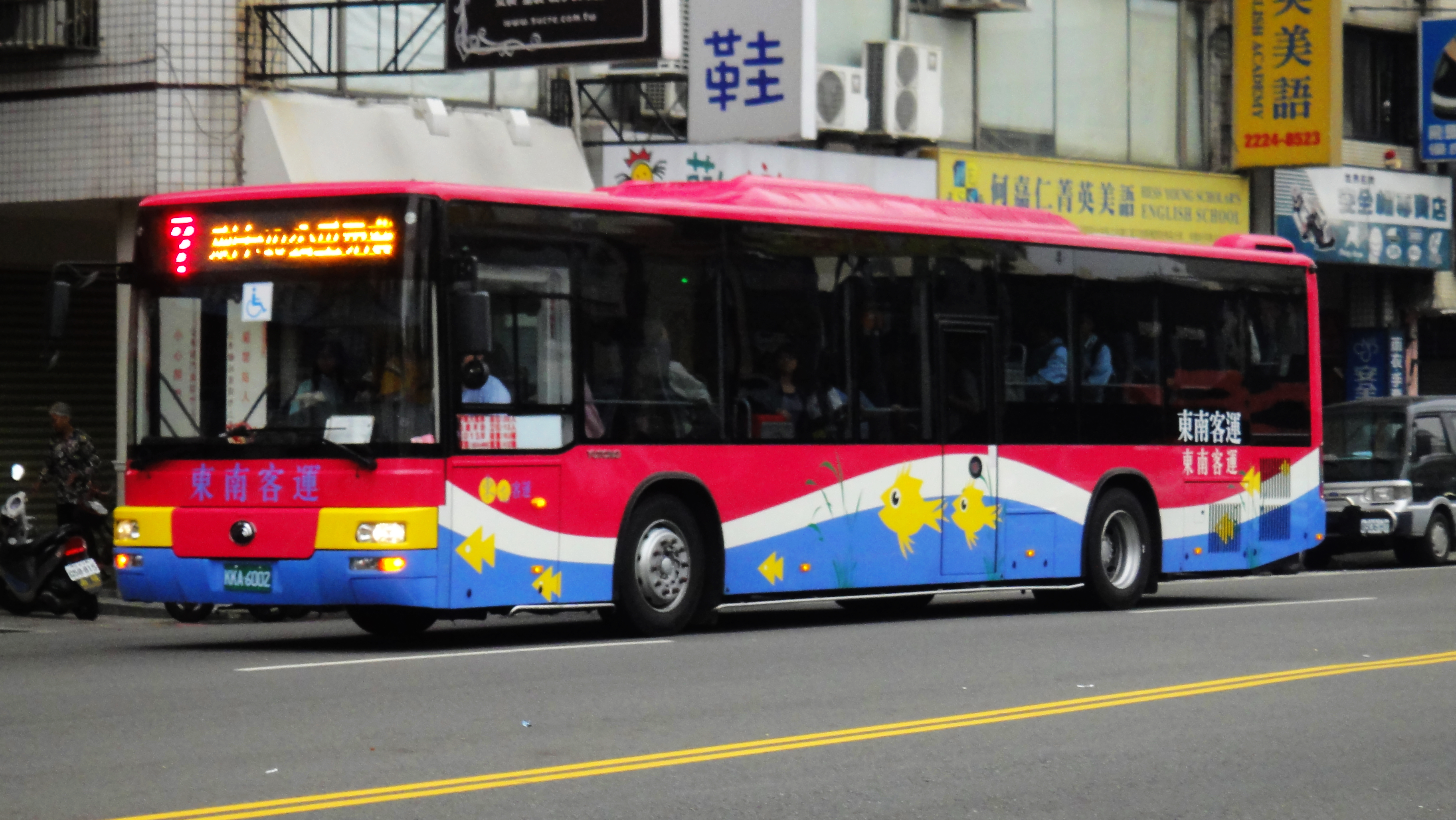 中文（台灣）: 東南客運2015年宇通ZK6128HG大客車KKA-6002行駛臺中市公車7線。